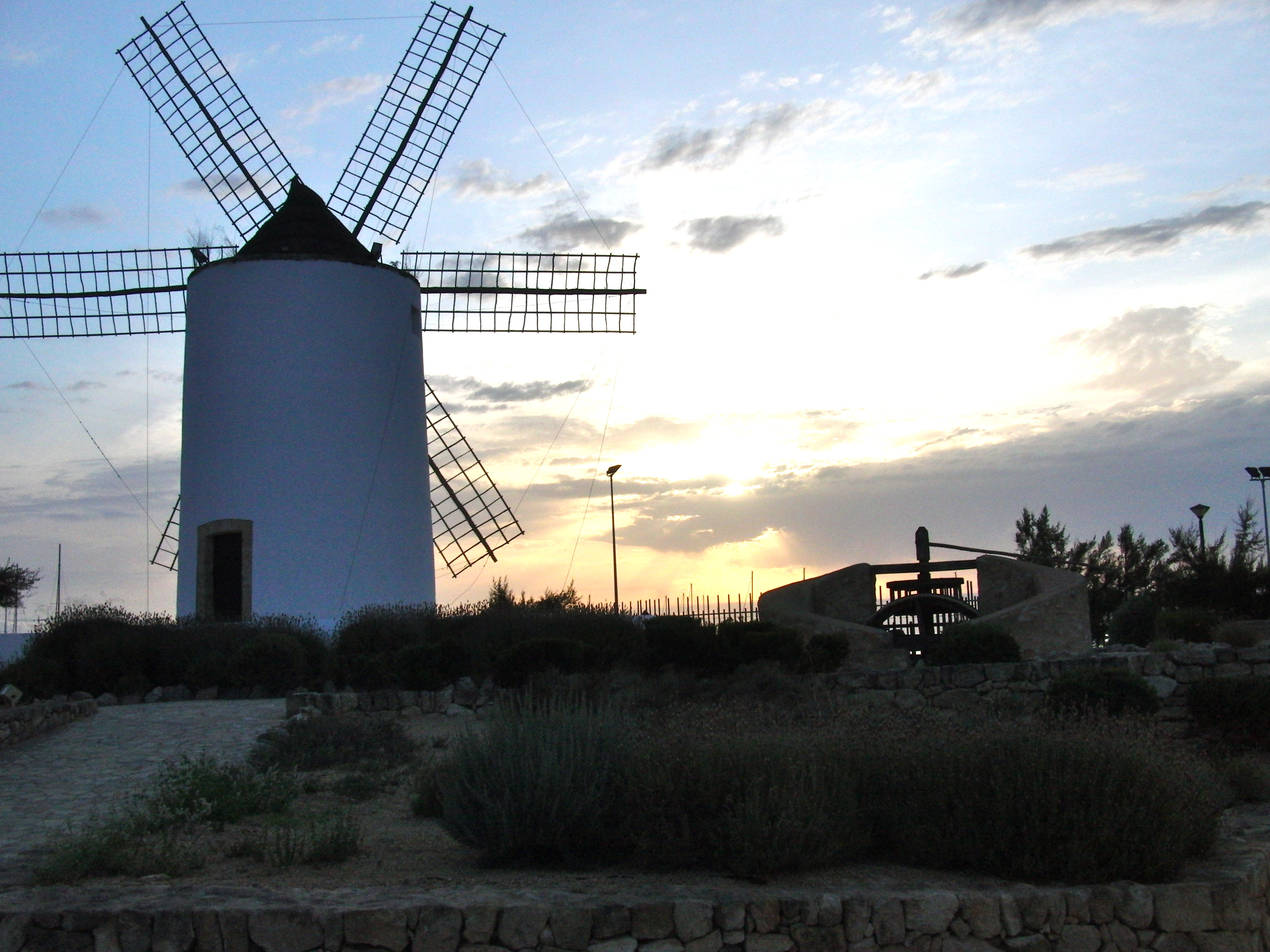 Sa Punta des Molí. Heute als Kulturveranstaltungsort genutztes Ensemble aus Mühle, Schöpfrad und zwei Gebäuden. Unter Denkmalschutz stehend